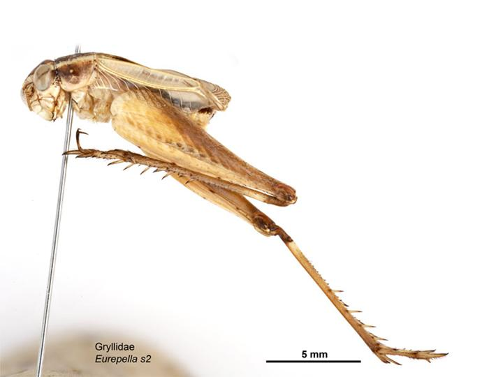 Eurepella mjobergi